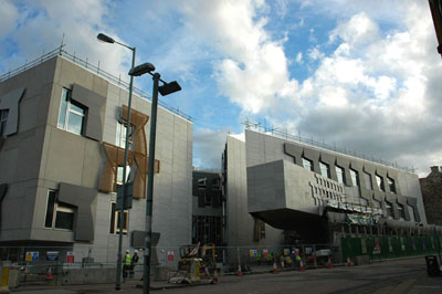 正在興建中的蘇格蘭國會大樓，愛丁堡，蘇格蘭 根據1997年一場公投決議，1998年時英國政府通過蘇格蘭法案，宣布要讓解散了300年之久的蘇格蘭國會再次成立。全新的蘇格蘭國會大樓位於蘇格蘭首府愛丁堡舊城的南區，因為開工之後工程進度一直延宕，原本預計要在2004年啟用的該大樓幾經波折（負責設計的建築師突然過世，因為大雨造成淹水），建造預算因此大幅超過當初估計達十倍程度而飽受批評。 相對於愛丁堡舊城古色古香的市容，由已故西班牙建築師米拉耶斯(Enric Miralles，巴塞隆納奧運運動場的設計者)構圖、造型非常現代化的國會大樓，顯得有點特殊或甚至格格不入的感覺。 照片中看到的，是從愛丁堡最重要的核心道路皇家一哩(The Royal Mile)南段、加農門街(Canongate St.)上望去的新國會背面。 本圖片由上傳者User:SElephant拍攝於2004年8月。